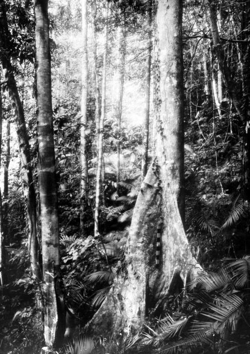 Repronegatief. Bos op de Gunung Ajambana